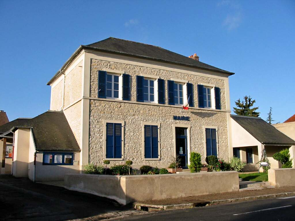 Mairie de Jumeauville (Yvelines) Photo JH Mora, novembre 2005